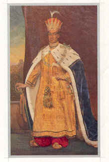 /king Nasiruddin Haider or nasir ud din Haidar a King of Awadhh